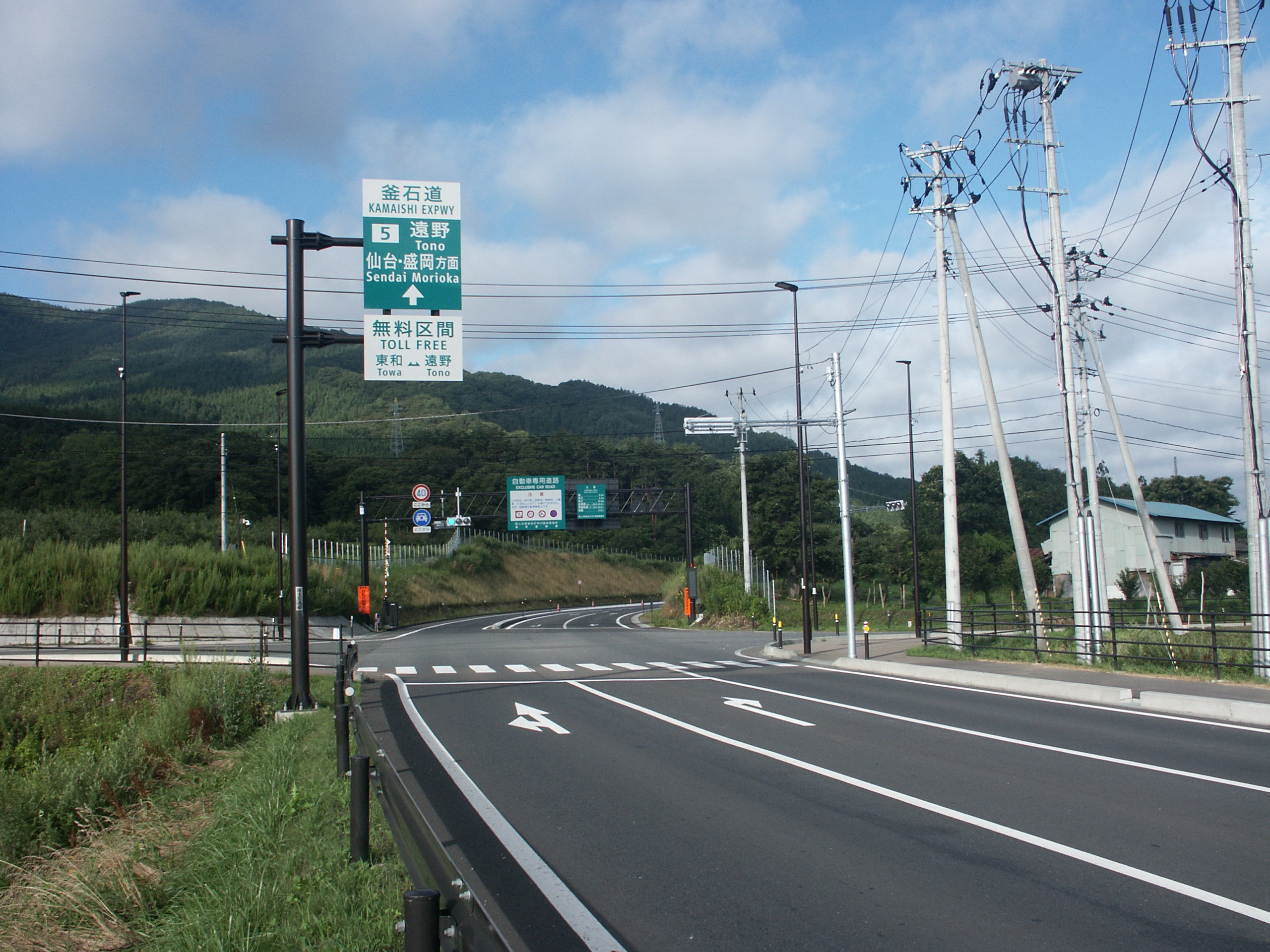 釜石自動車道遠野IC出入口付近